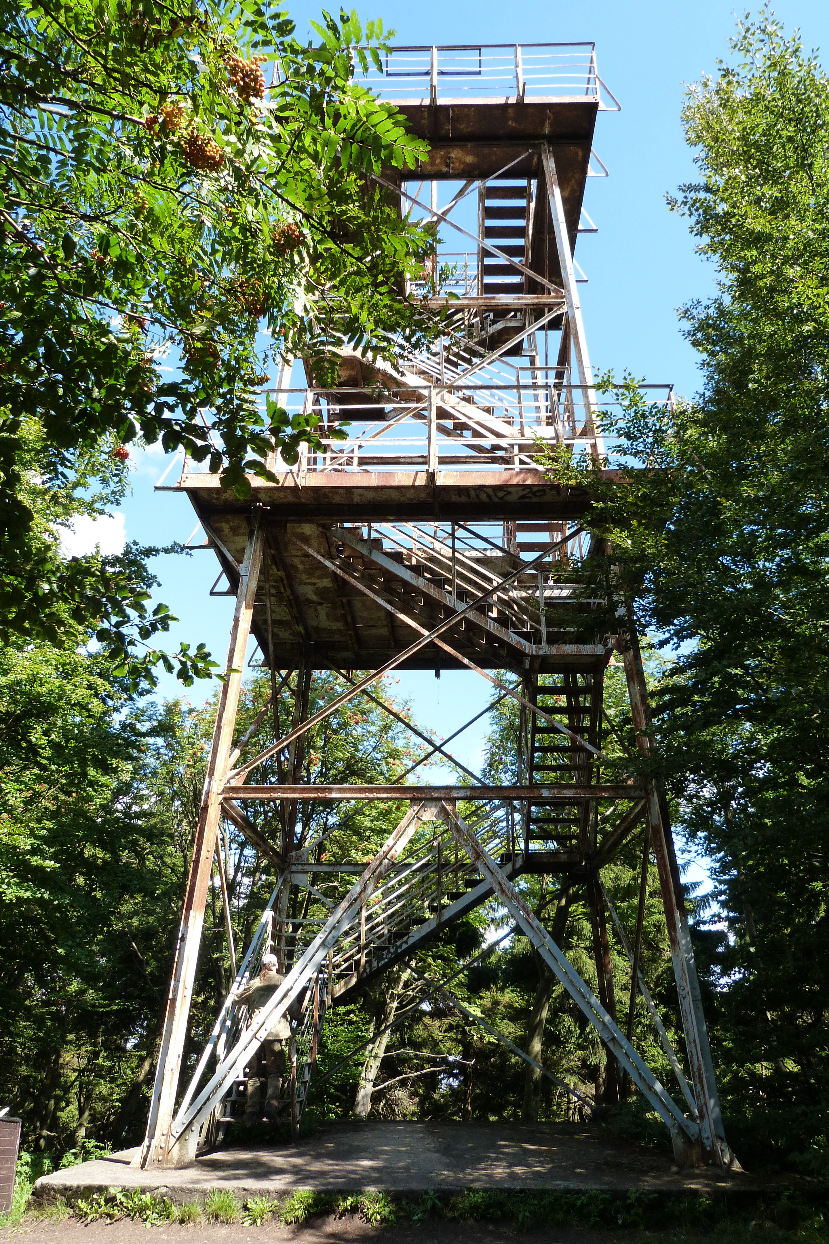 Park krajobrazowy: Park Krajobrazowy Gór Sowich This is a photography of protected area with CRFOP ID PL.ZIPOP.1393.PK.1